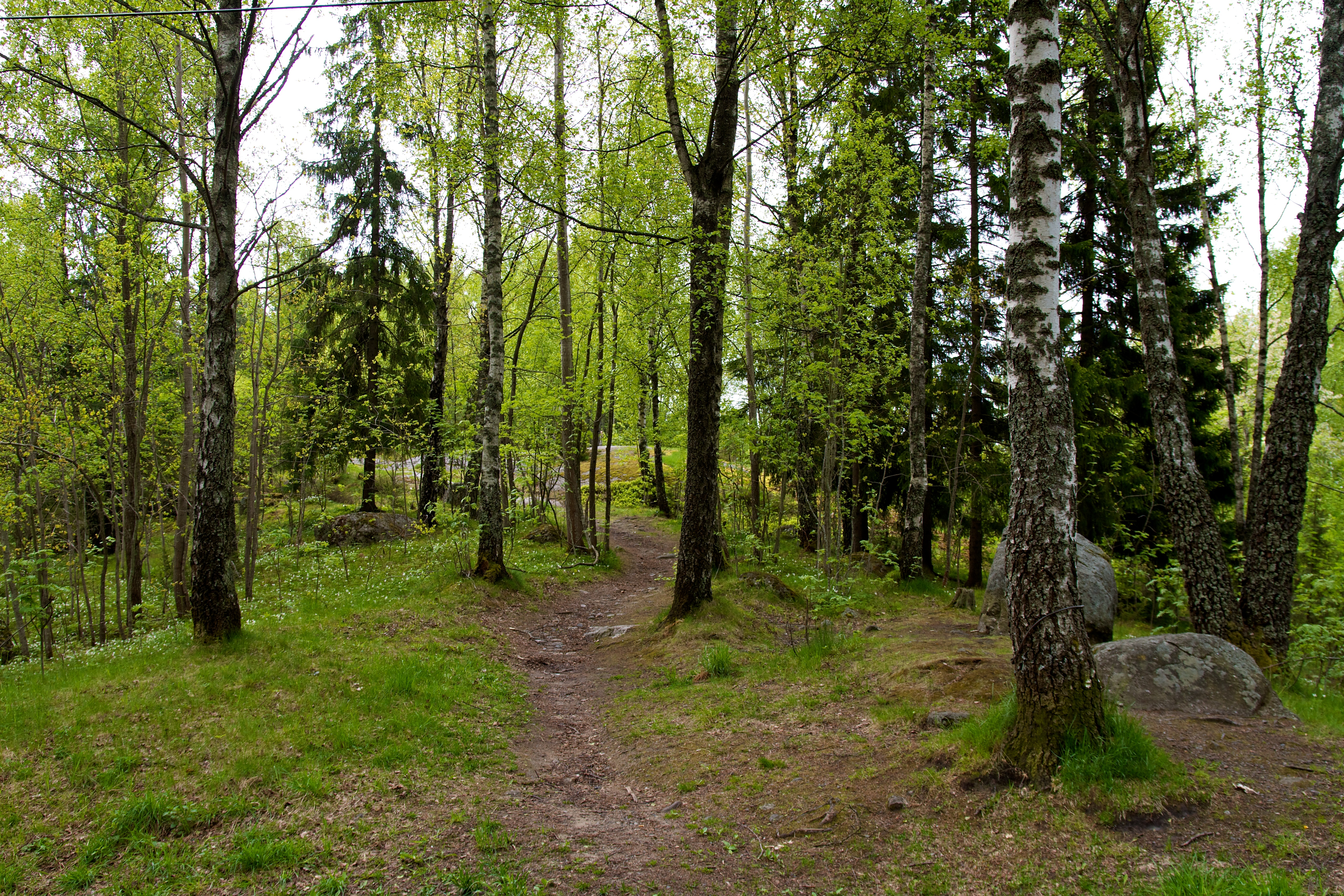 Oldtidsveien på Langerud i Oslo.